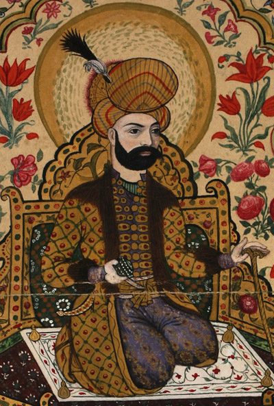 1708. დავით II/იმამყული-ხანის წყალობის განახლების სიგელი წმ. დავითის საფლავისადმი. ფრაგმენტი